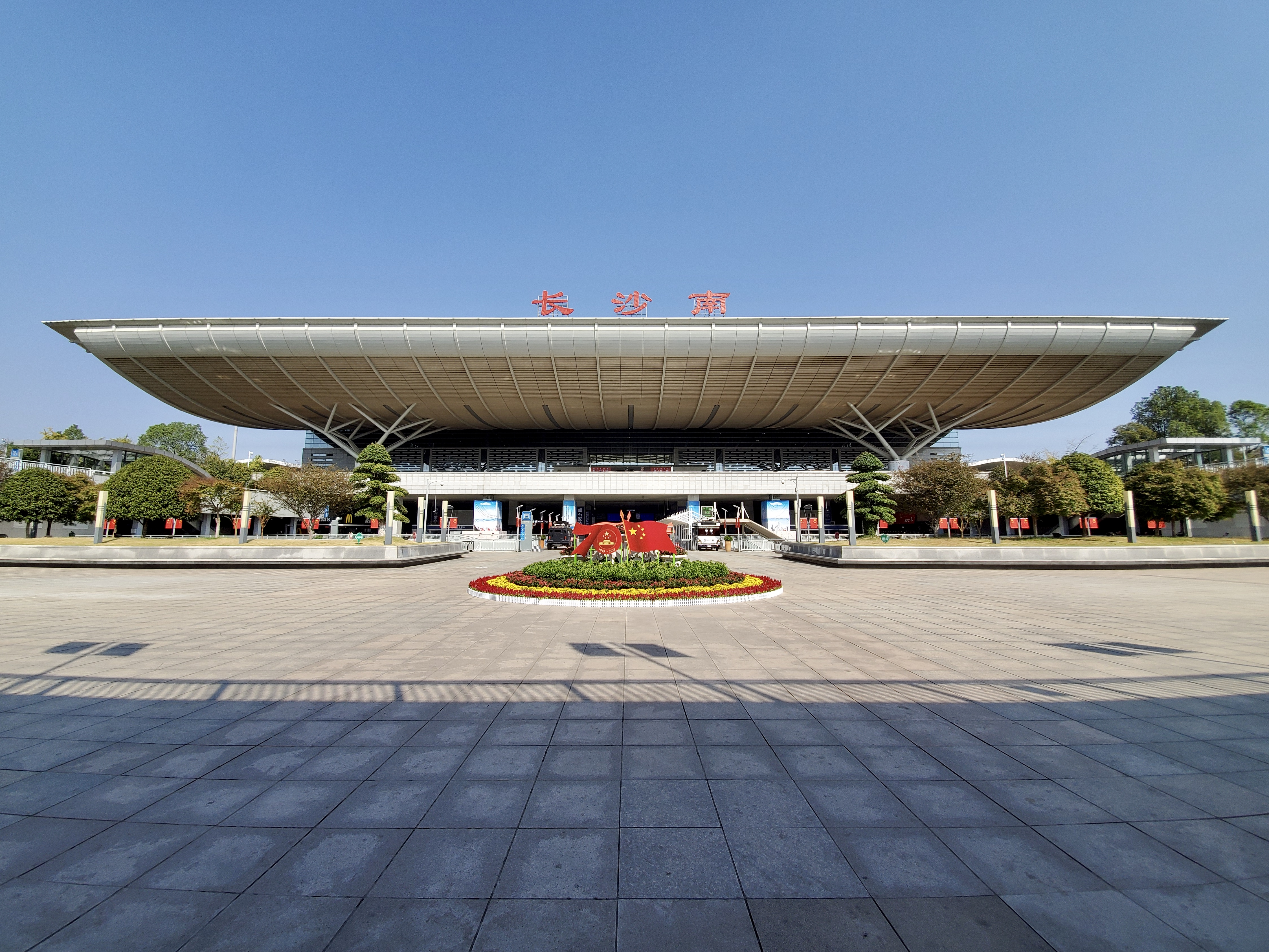 与长沙南站西广场拍摄的长沙南站和长沙南站西广场